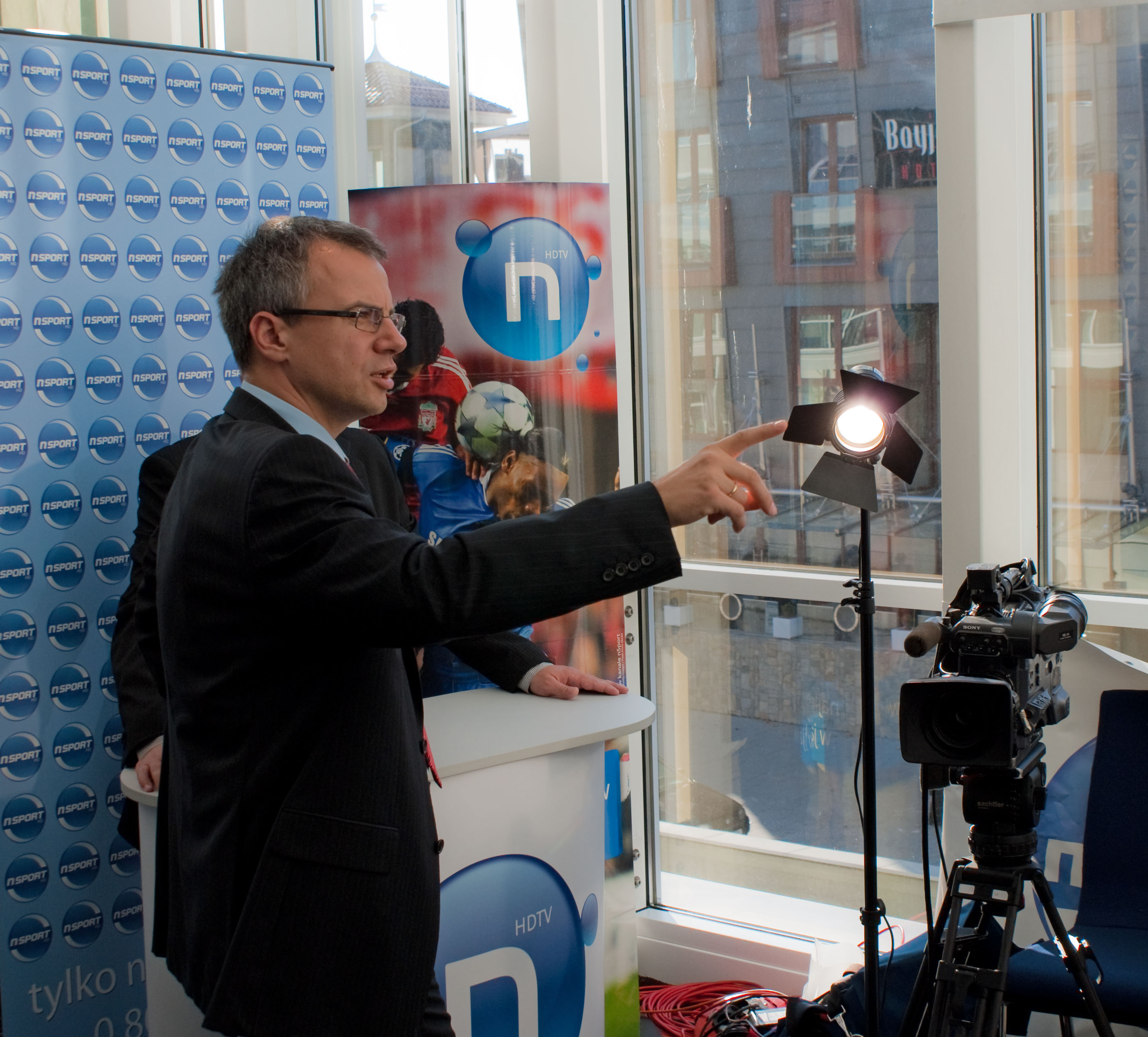 Piotra Salak na stoisku promocyjnym kanału nSport podczas konferencji PIKE 2010. Hotel Sheraton, Sopot.